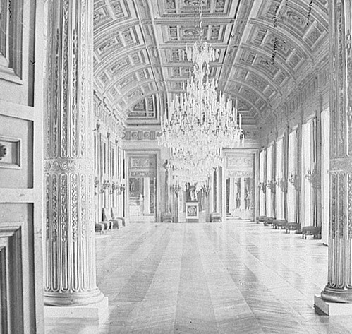 Galerie de la Paix (entrée) du Palais des Tuileries